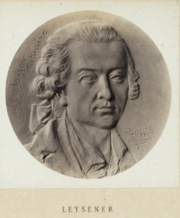 Médaillon en bronze de 14 cm de diamètre réalisé par David d'Angers (1788-1856) et représentant Jean-Sébastien Leysner, sculpteur (1728-1781)